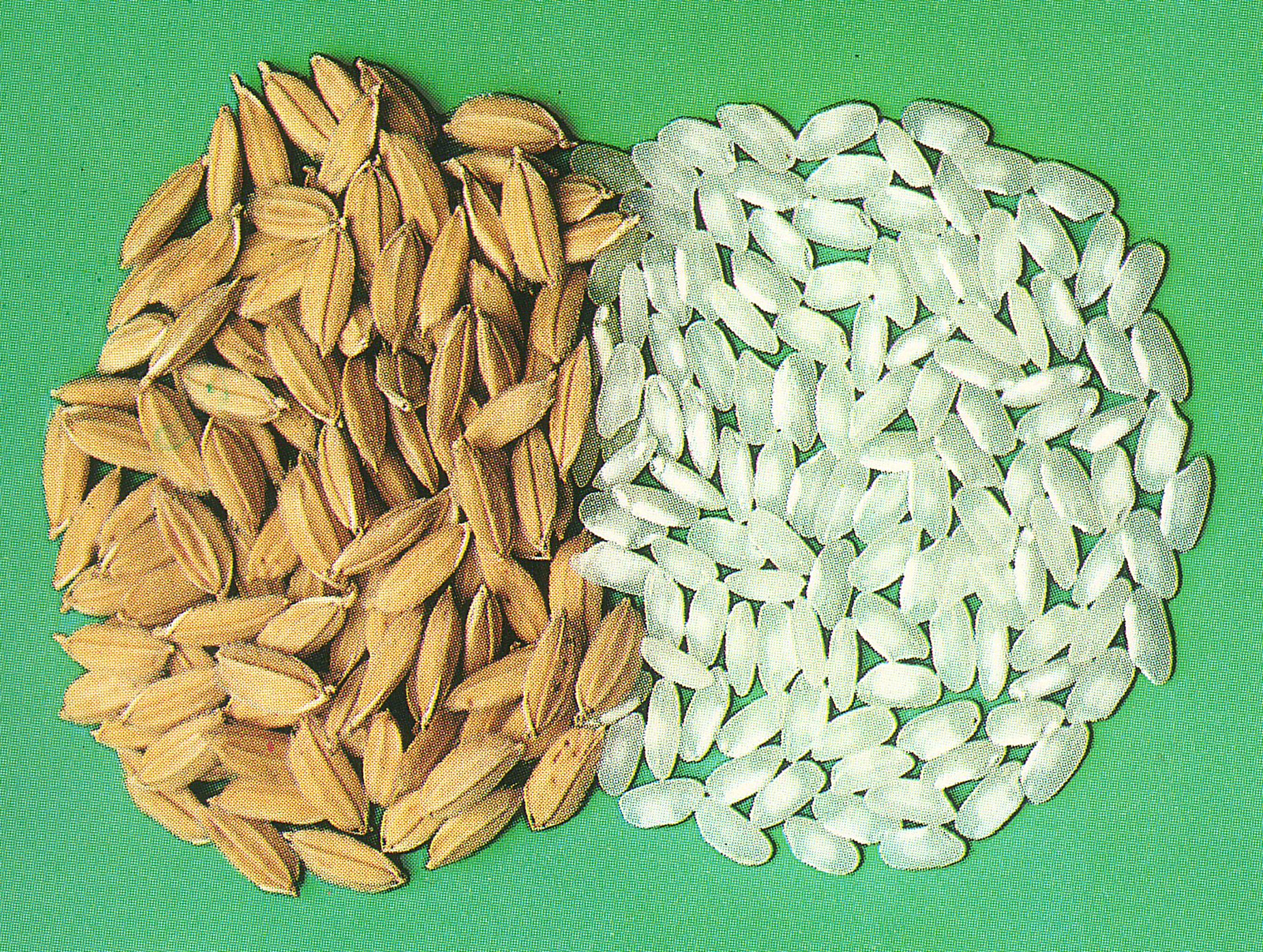 Risone e riso lavorato appartenenti alla Varietà Storica da Conservazione Razza 77